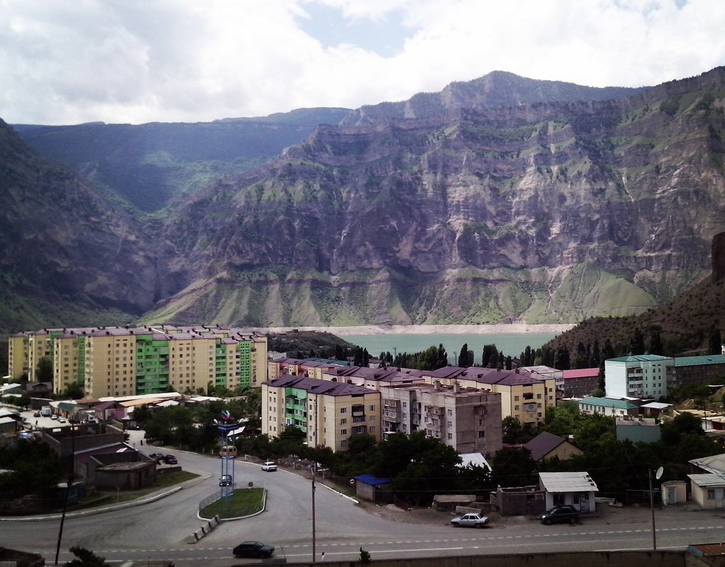 Авар: Дагъистаналъул Унсоколо мухъалда бугеб шагьар тайпаялъул гьен Шамилхъала